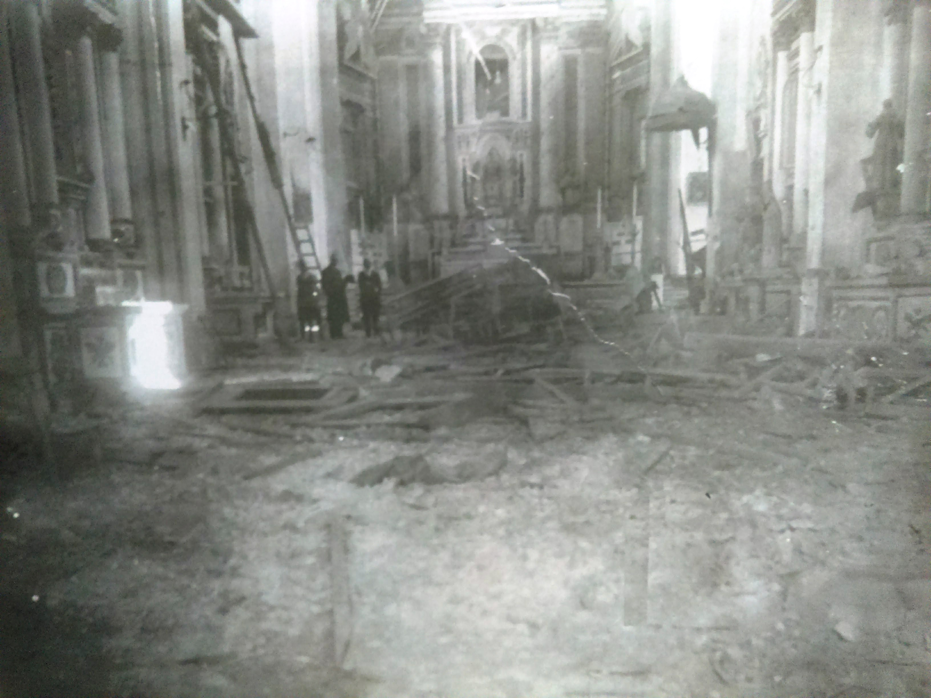 Exhibición Convento de san Francisco en el tiempo.